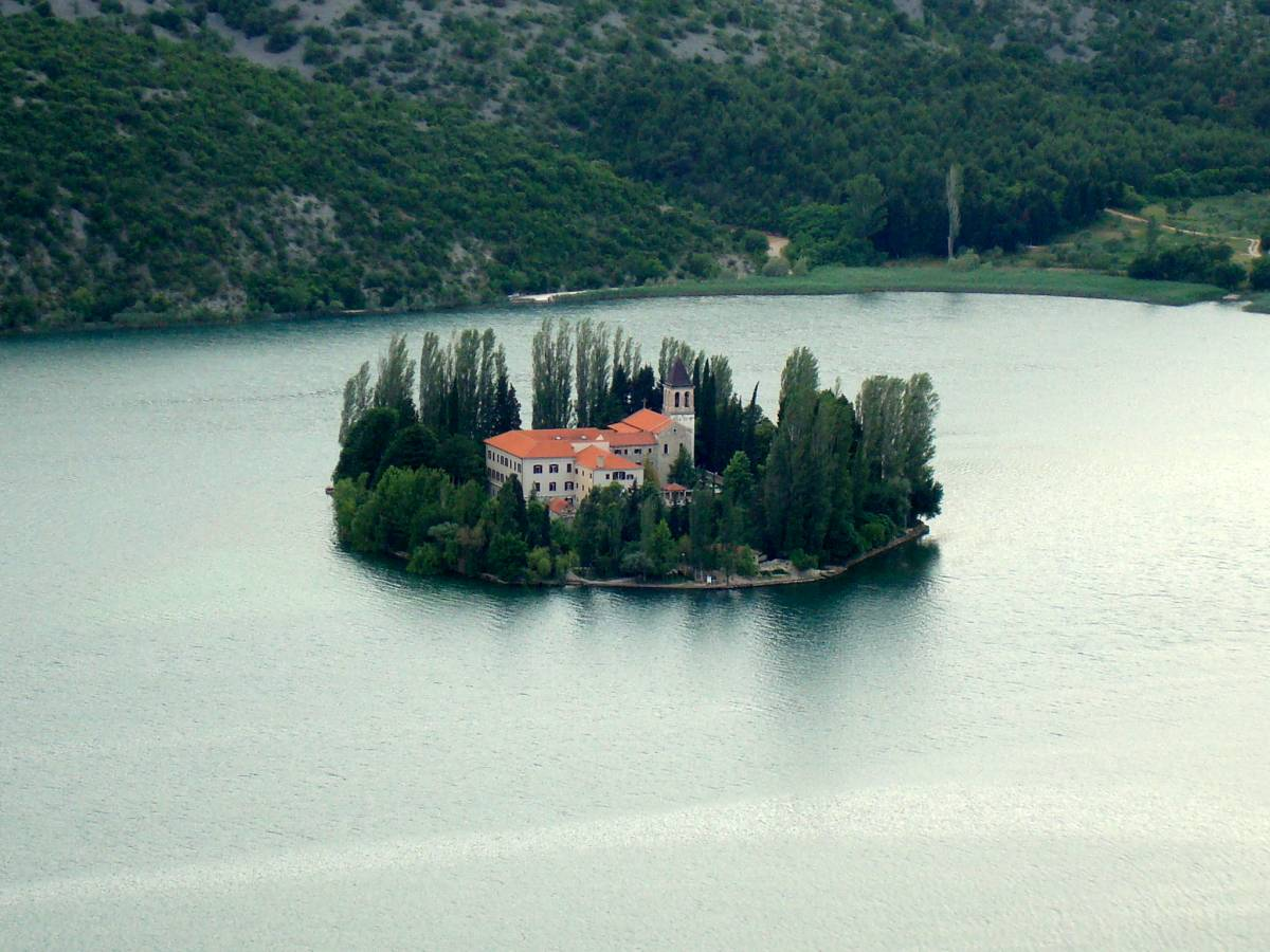 Vue du monastère de Visovac depuis le belvédère situé sur la route de Drinovci à Siritovci en Croatie.